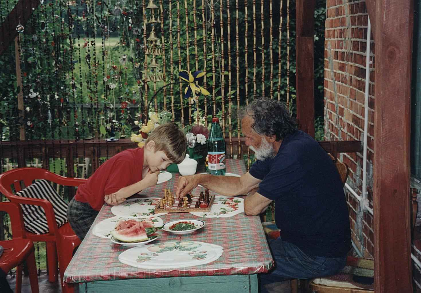 Ryszard Tomczyk (z prawej) grający w szachy.